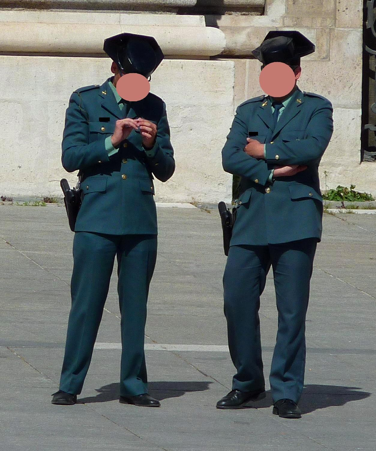 Guardias Civiles con tricornio.